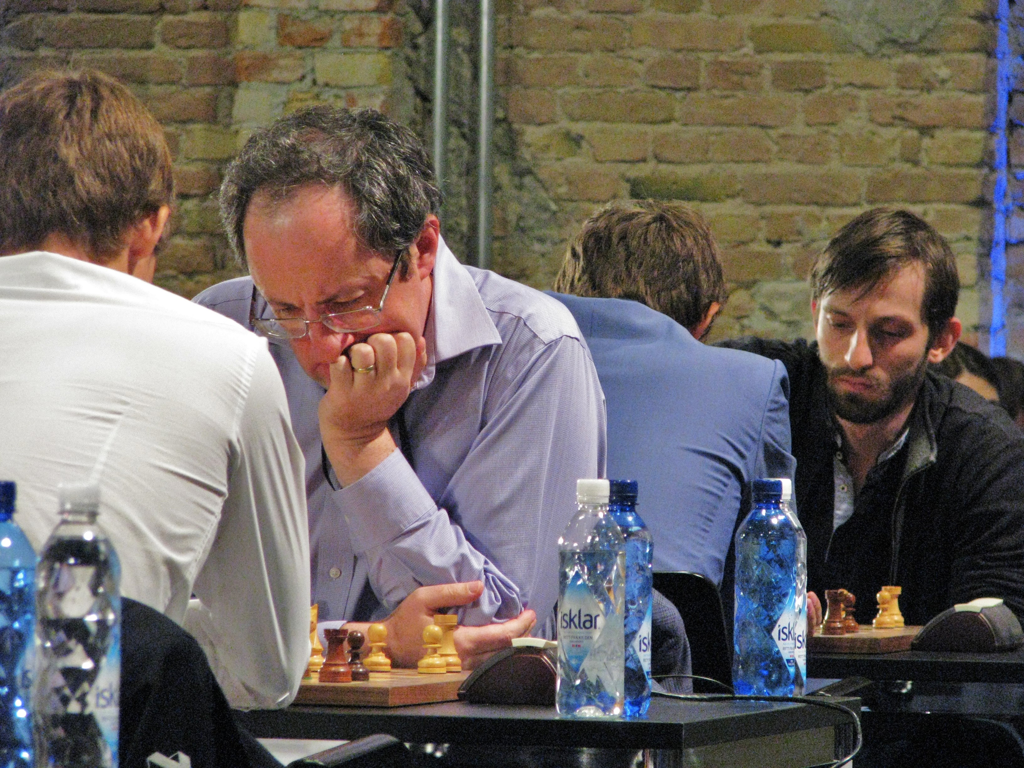 Grischuk (hinten) auf dem Weg zu seinem 3. WM-Titelgewinn in Berlin 2015